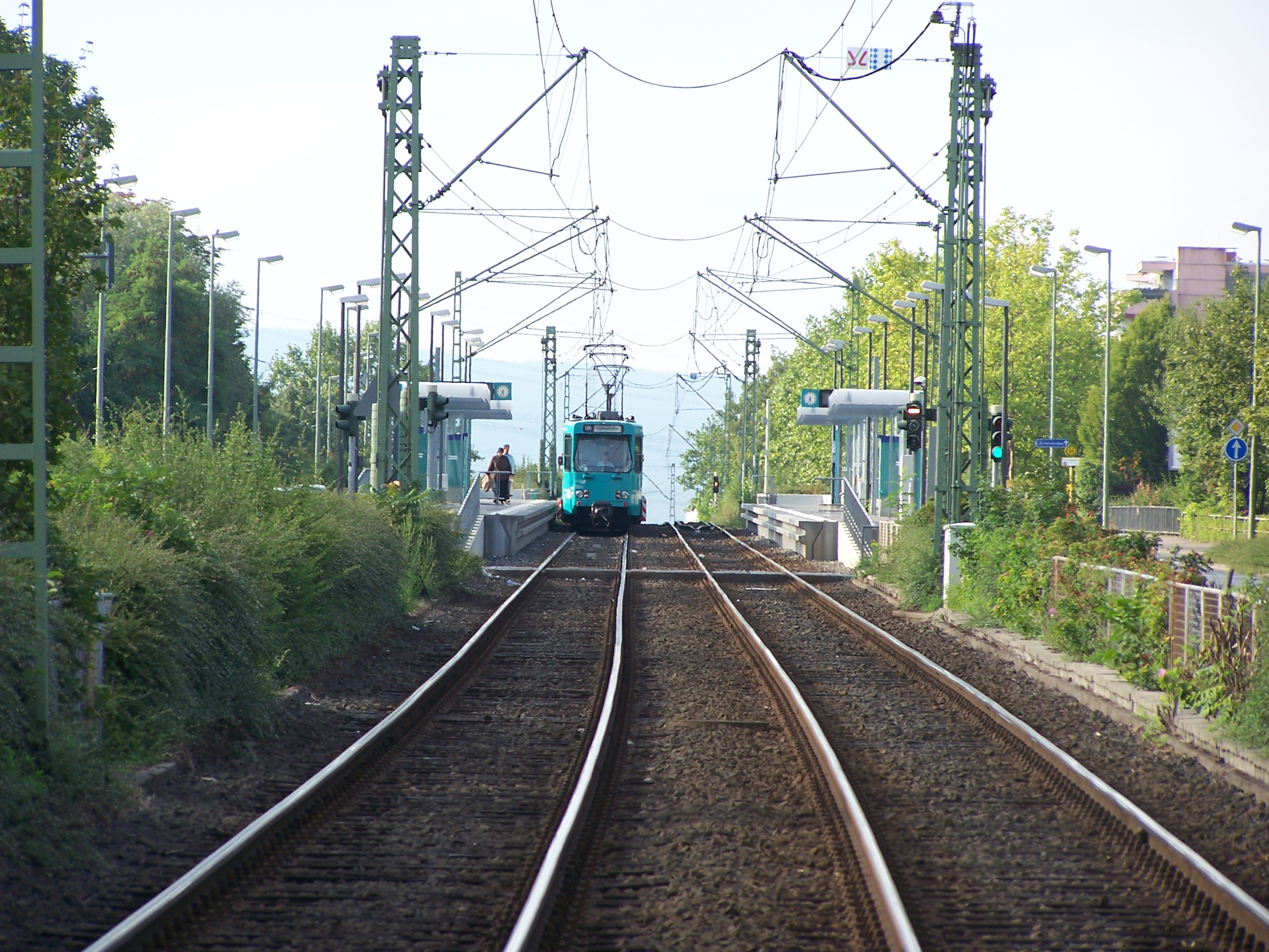 Stadtbahngleise der U6 auf der Ludwig-Landmann-Str., im Hintergrund der Taunus